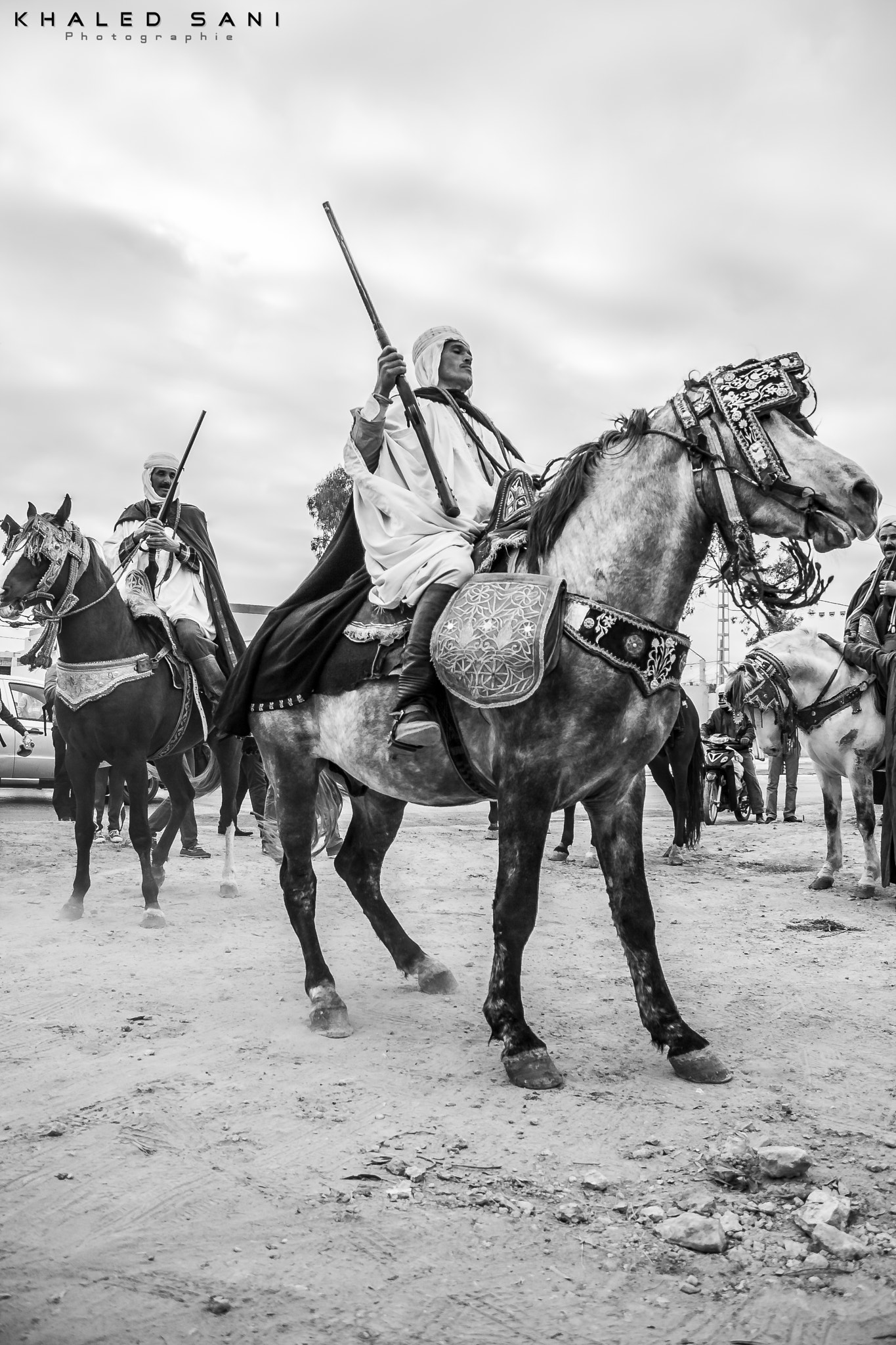 500px provided description: Fantasia 2